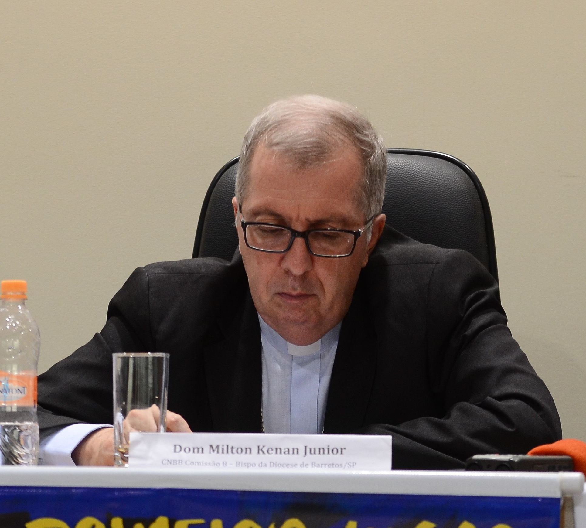 São Paulo - Dom Milton Kenan Junior, bispo da Diocese de Barretos, na coletiva do Grito dos Excluídos